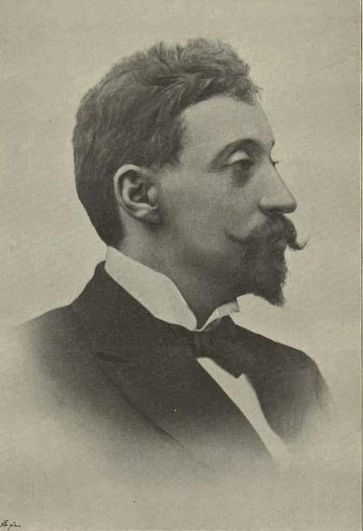 Henrik Bernhard Jæger (født 4. januar 1854 i Bergen, død 17. desember 1895) var en norsk kritiker og litteraturhistoriker.